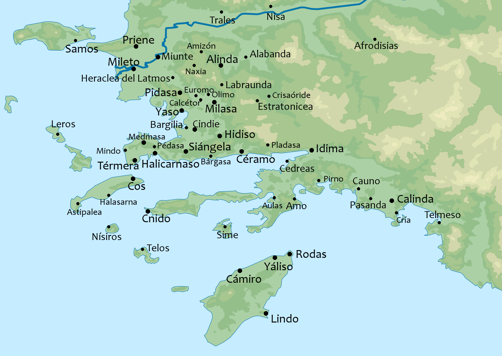 Mapa con algunas de las antiguas ciudades griegas de Caria y de algunas islas del Dodecaneso.